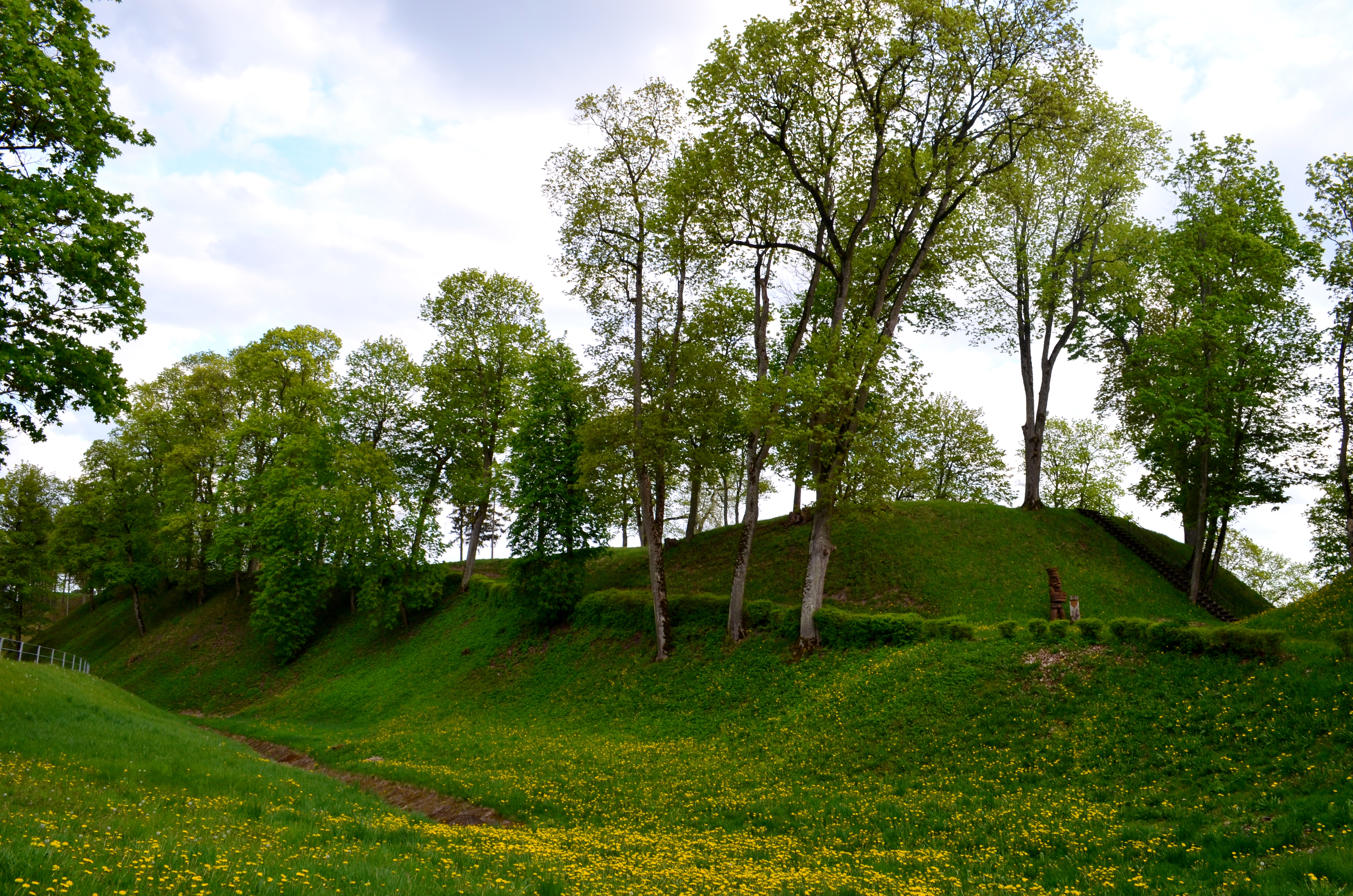 Veliuonos piliakalnis, Jurbarko raj.